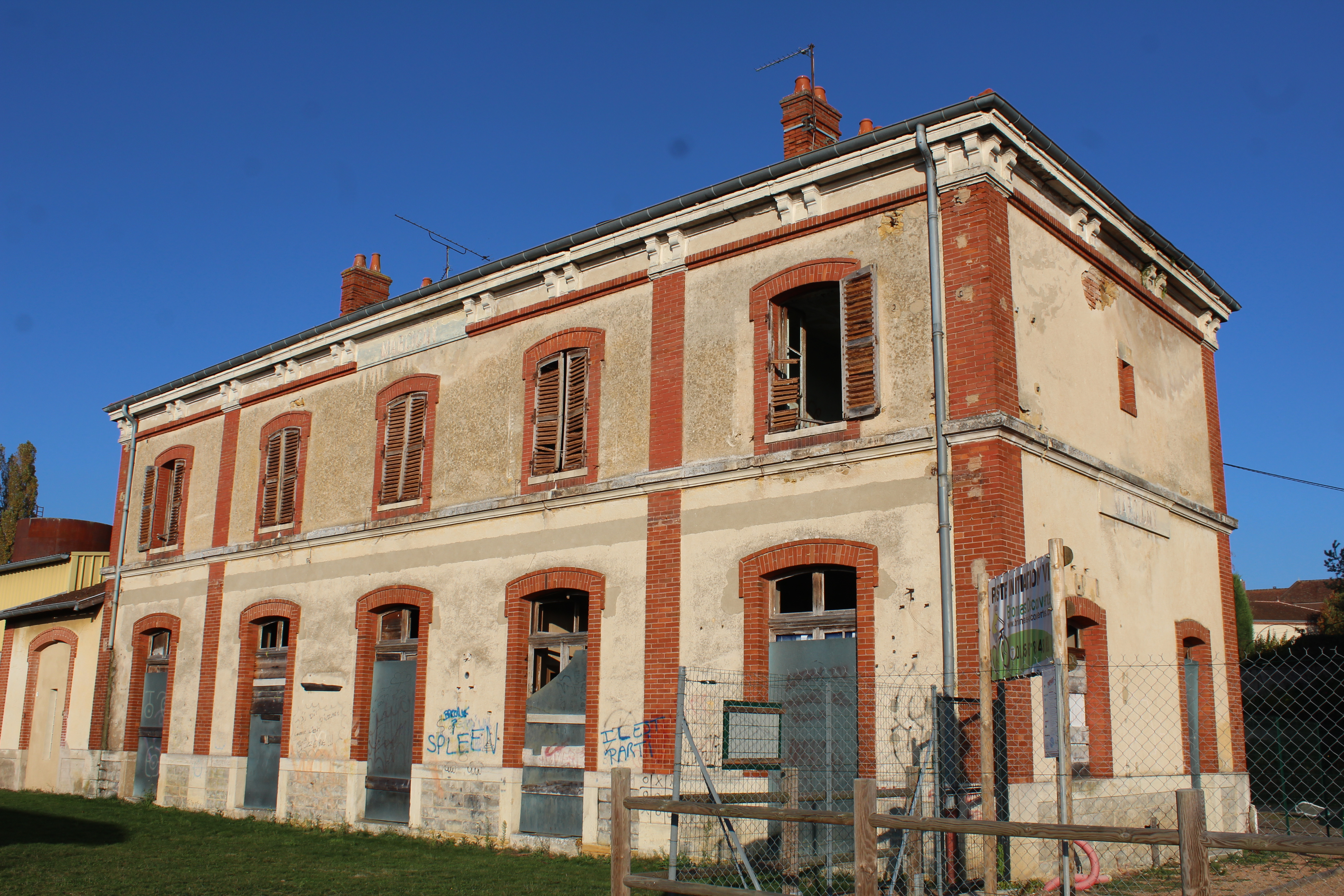 Ancienne gare de Maricigny.